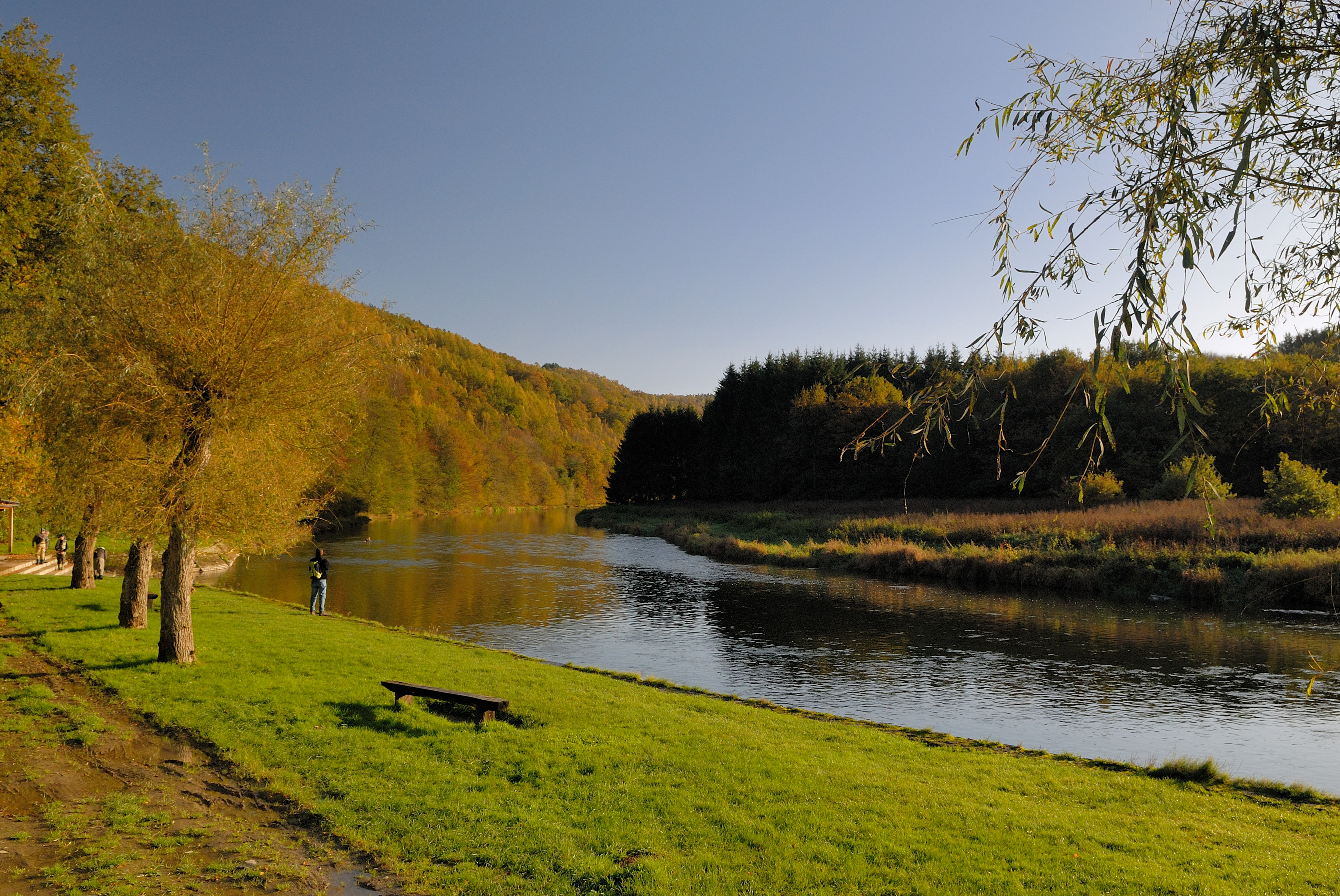 La Semois passant à Vresse-sur-Semois un jour d'automne.